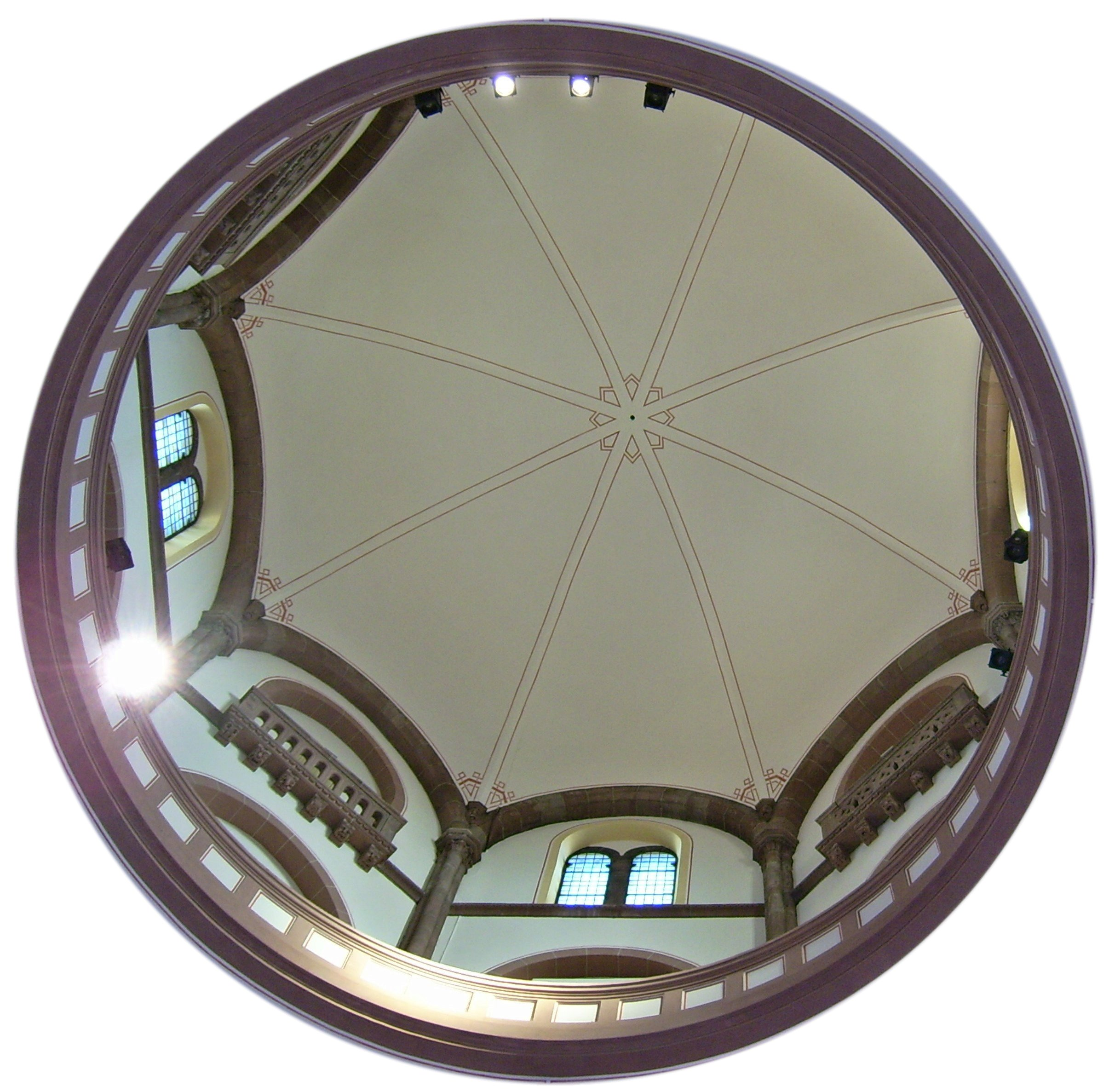 Blick in die Kuppel